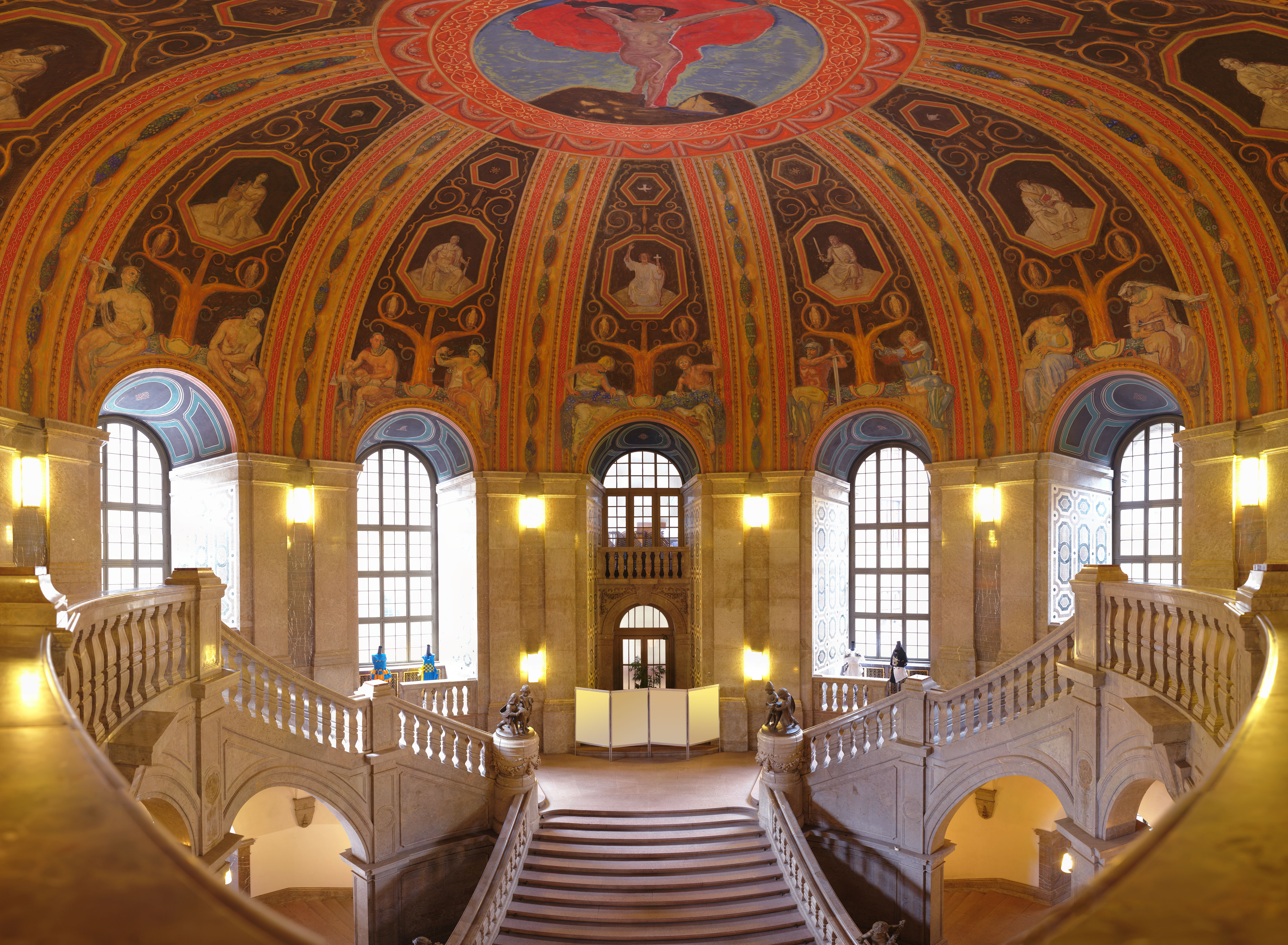 Prunkvolle Treppenhausgestaltung im Neuen Rathaus Dresden von Otto Gussmann 1910-1914